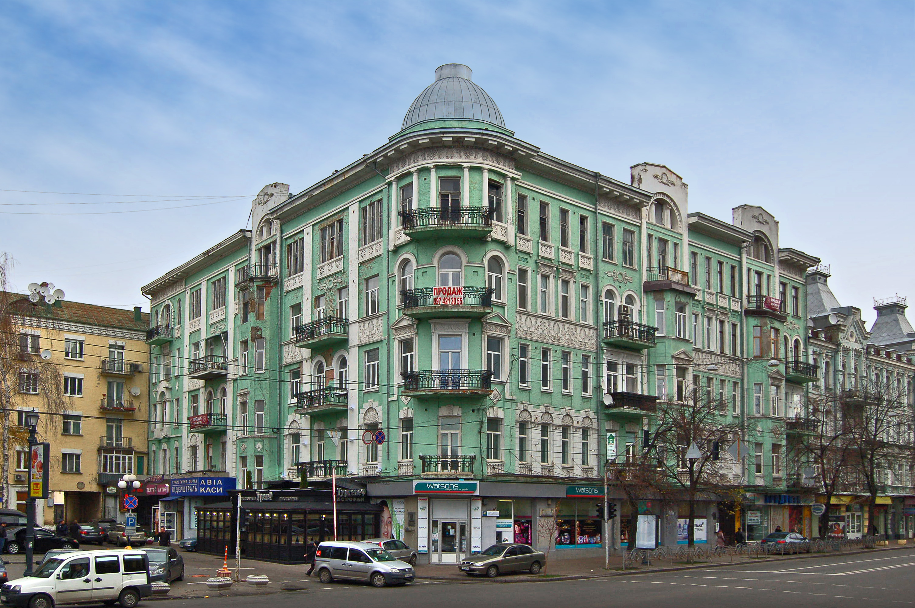 Будинок № 40 по Великій Житомирській вулиці у Києві